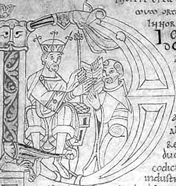 Lettre majuscule d'un manuscrit présentant Guillaume de Jumièges offrant sa Gesta Normannorum ducum à Guillaume le Conquérant